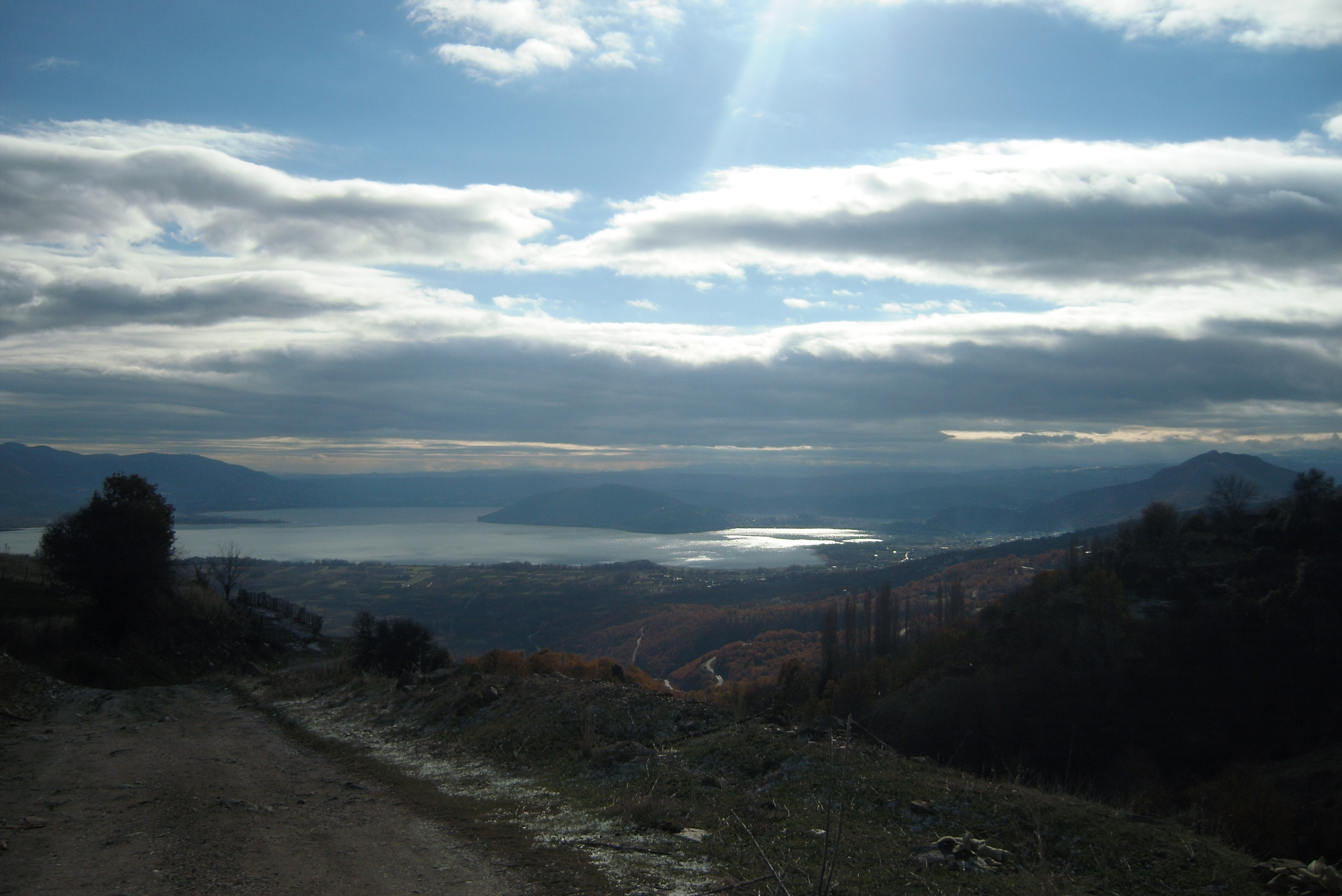 Костурското езеро от пътя Шестево - Жервени